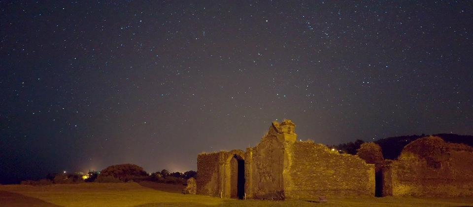 Vista de La Iglesia Colonial en una hermosa noche, en esta bella Isla, con el cielo estrellado